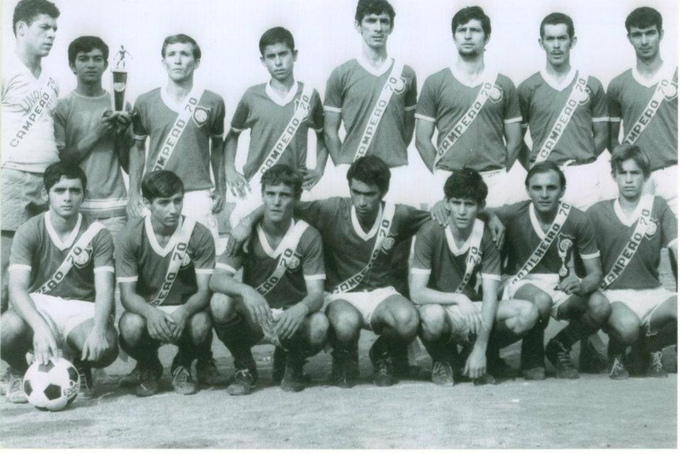 Equipe do Unaí Esporte Clube, campeã de torneio amador em 1970